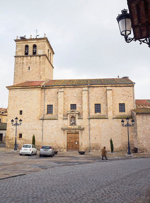 Iglesia de Santiago en Turégano, provincia de Segovia, Castilla y León, España.